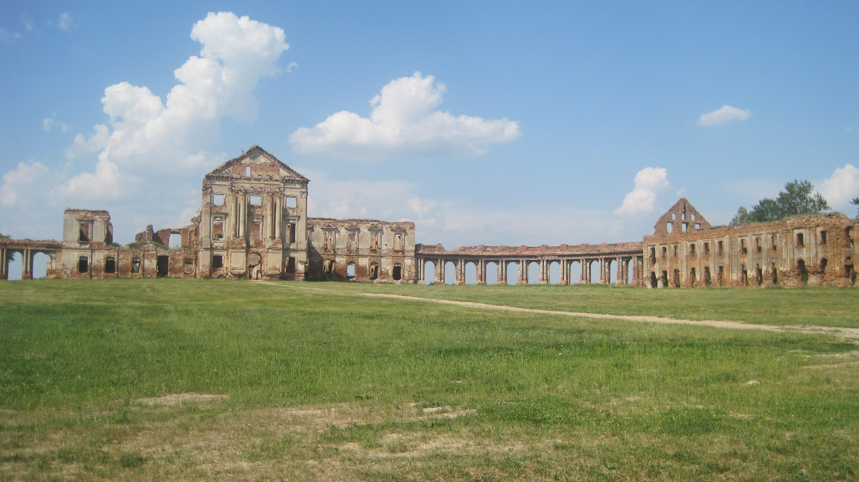 Palais Sapiega à Roujane